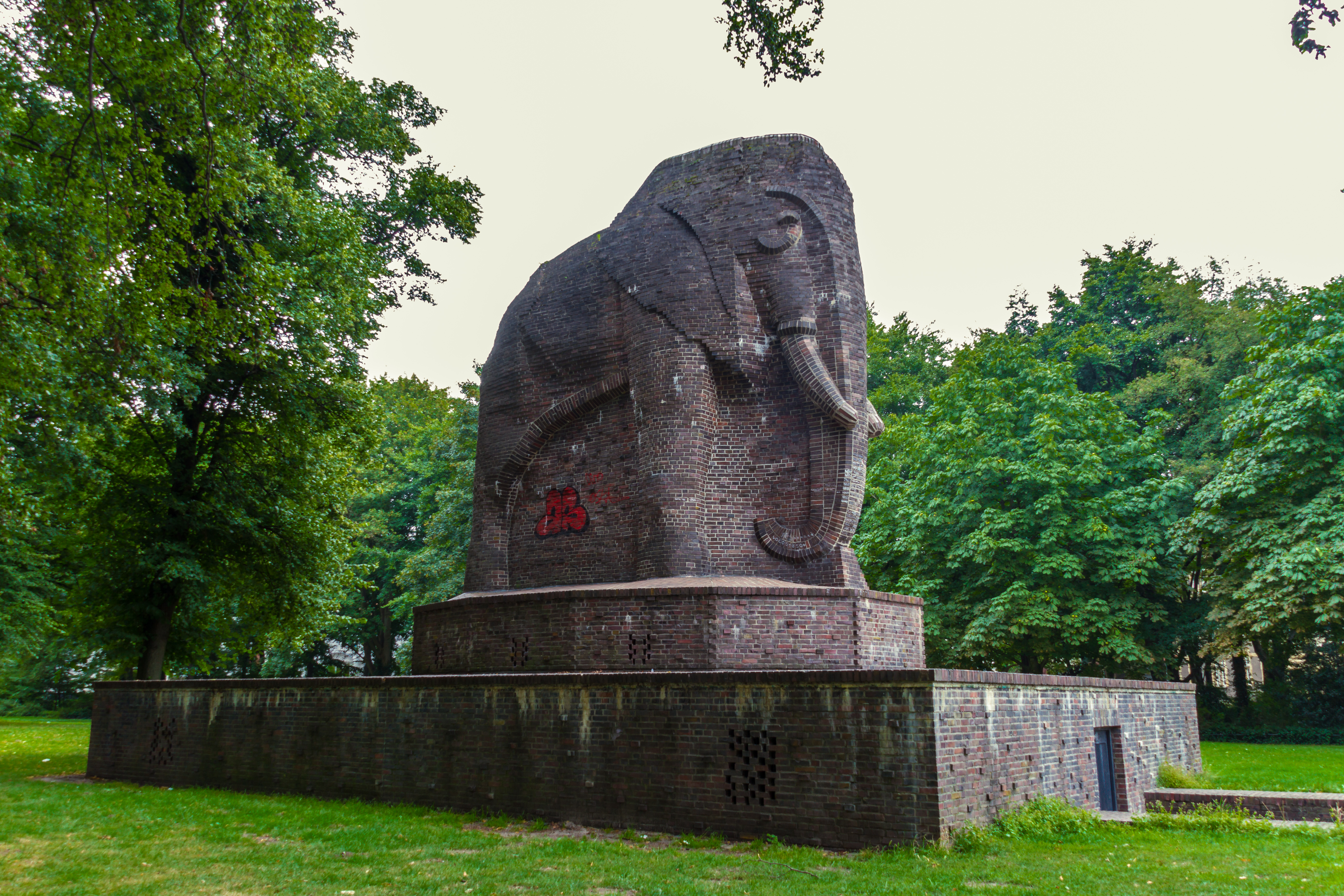 Kolonial-Ehrenmal, Anti-Kolonial-Denk-Mal in Bremen, Gustav-Deetjen-AlleeDas abgebildete Objekt ist ein geschütztes Kulturdenkmal in der Freien Hansestadt Bremen, mit der Nr. 1771 beim Landesamt für Denkmalpflege registriert.